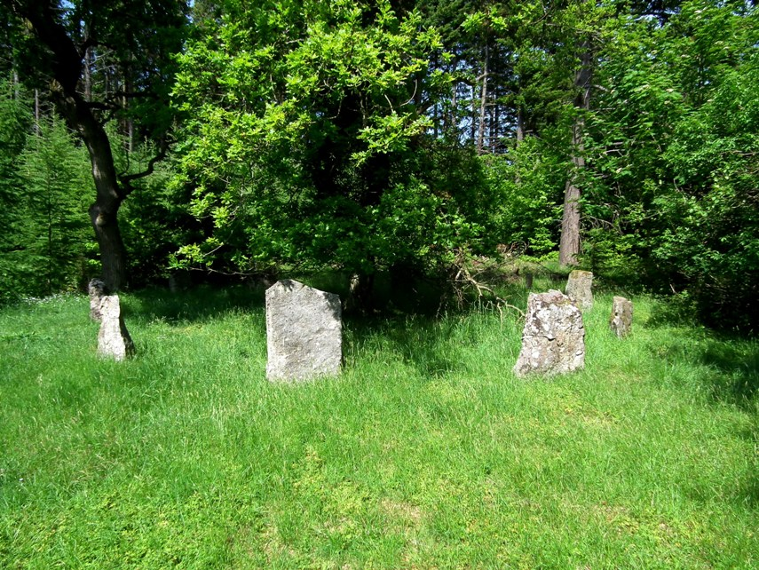 menhiry Hjortebakke